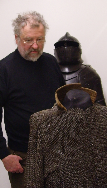 Dr. Marcus Junkelmann. Im Hintergrund ein "Pappenheimer", im Vordergrund ein mittelalterliches Kettenhemd, Dresden, April 2008